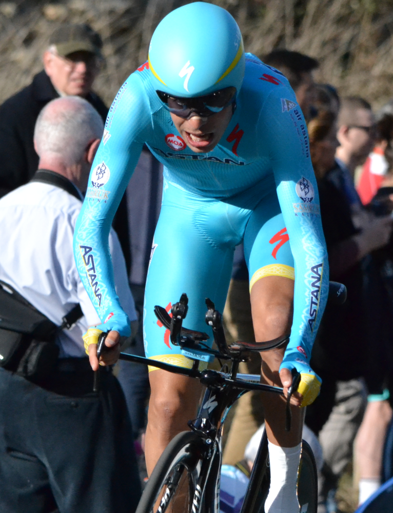 Paris-Nice 2015